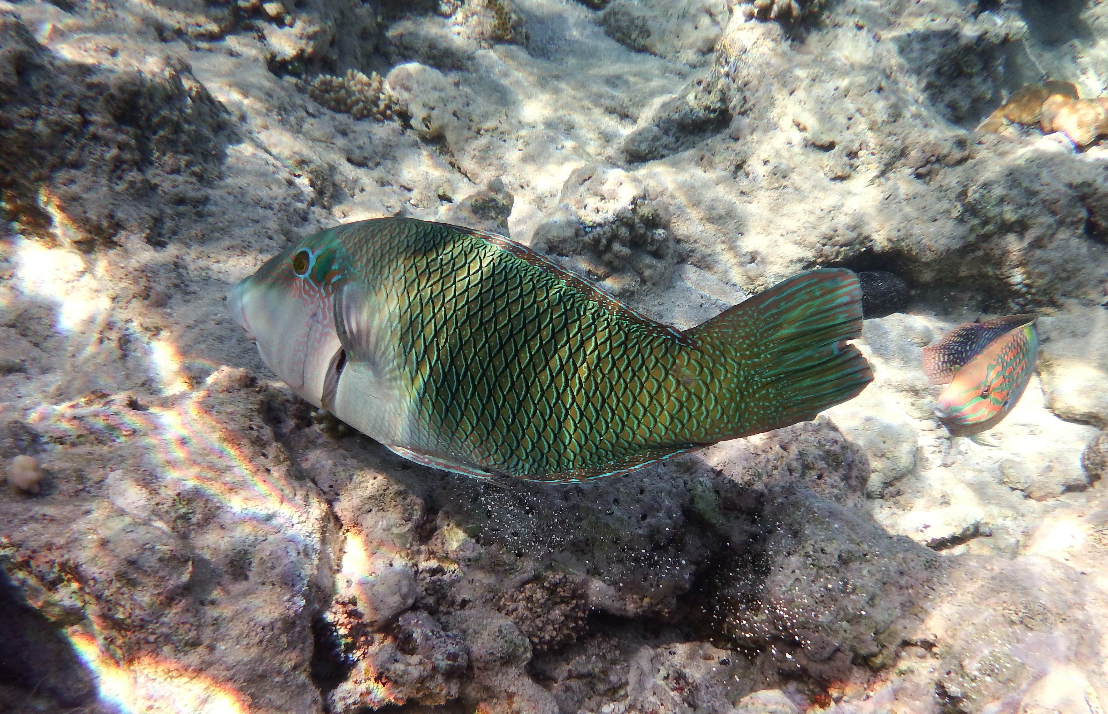 Hemigymnus melapterus. Aufgenommen im Roten Meer in Ägypten, Makadi Bay. Hotel Grand Makadi Hausriff. VIDEO